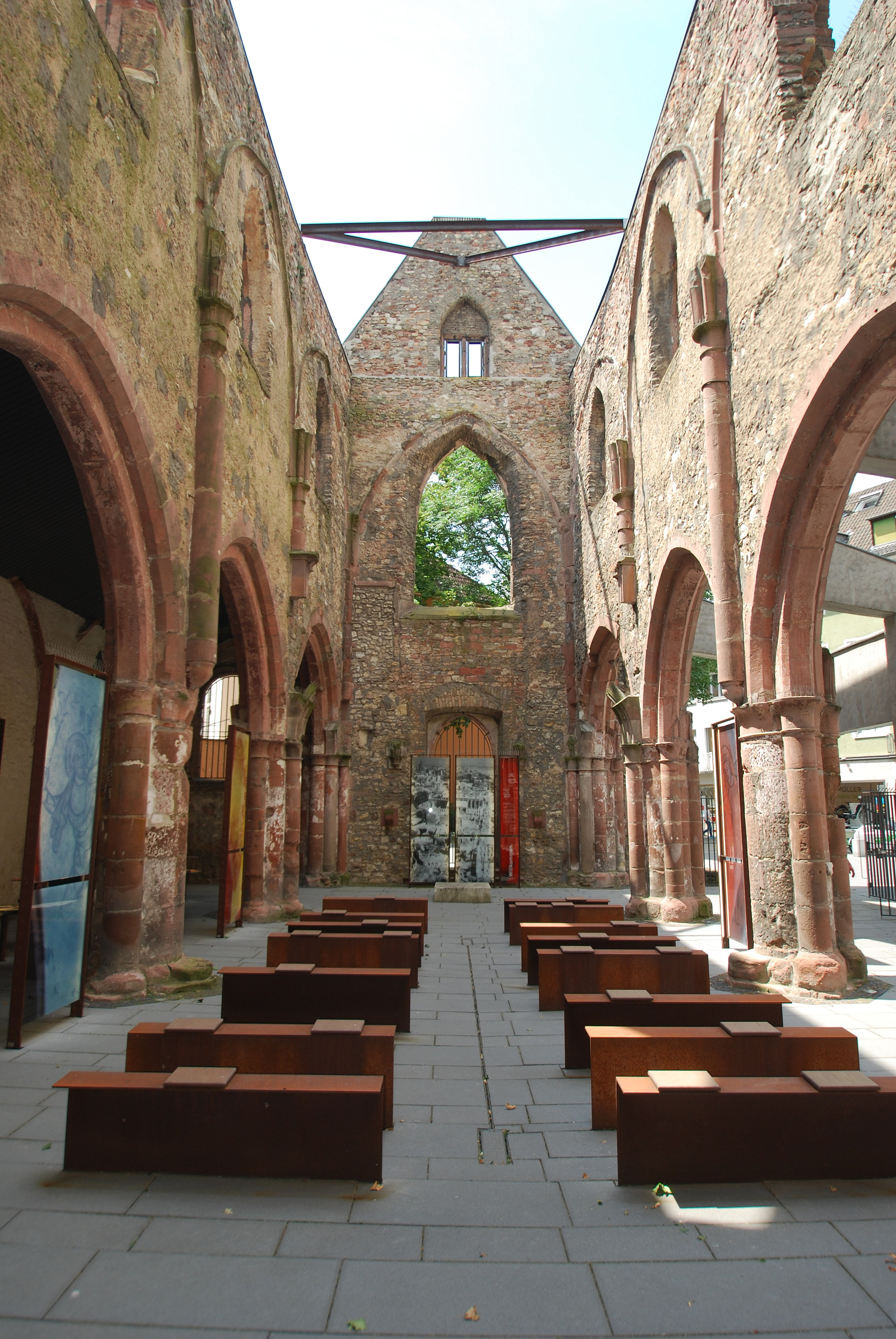 St. Christoph in Mainz, hergerichteter Gottesdienstraum, dauerhaft frei erreichbar